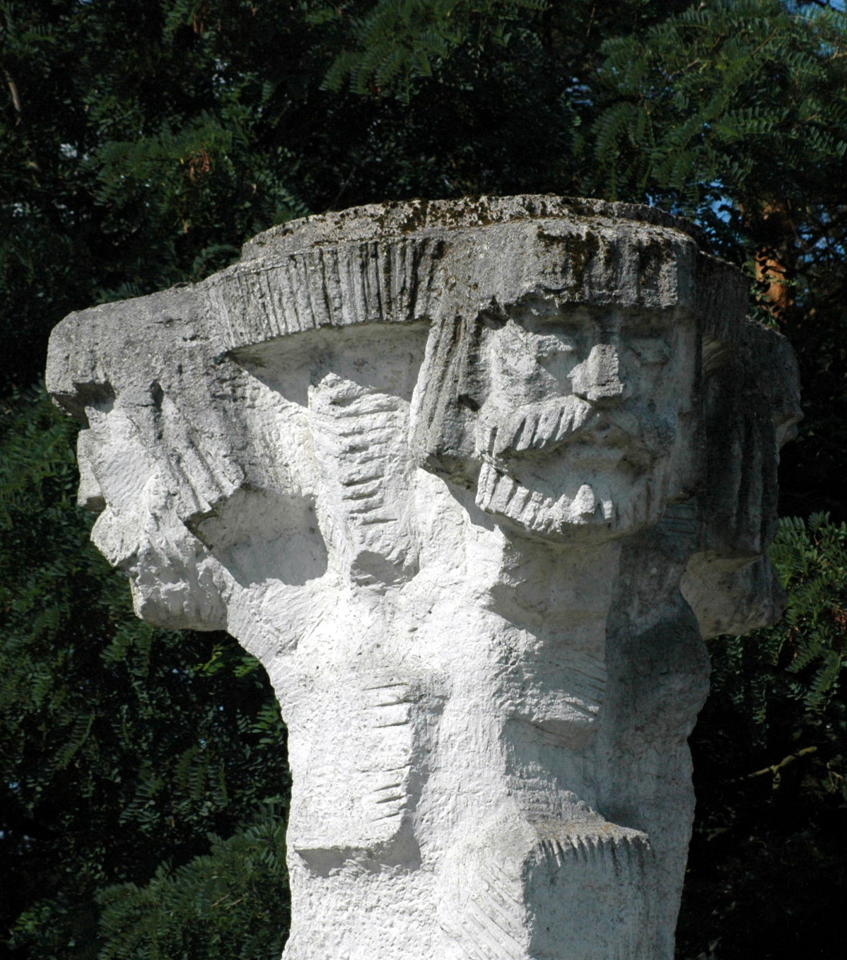 Trygław w Wolinie